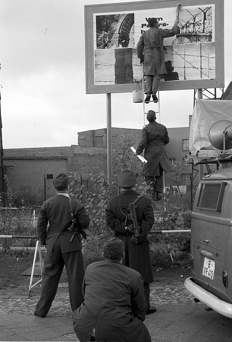 Polizisten bewachen Plakatwand an der Berliner Mauer am Potsdamer Platz, rechts im Bild ein Lautsprecherwagen des Studios am Stacheldraht